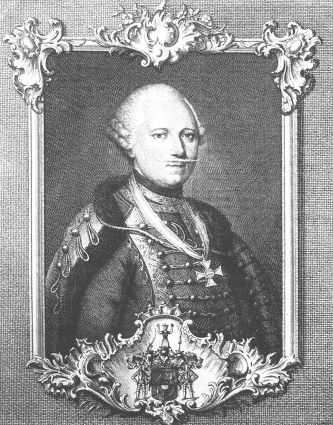 Dagobert Sigmund von Wurmser (1724—1797)